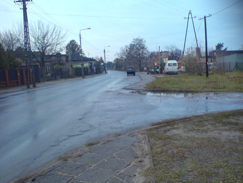 Kresy ul. Portowa